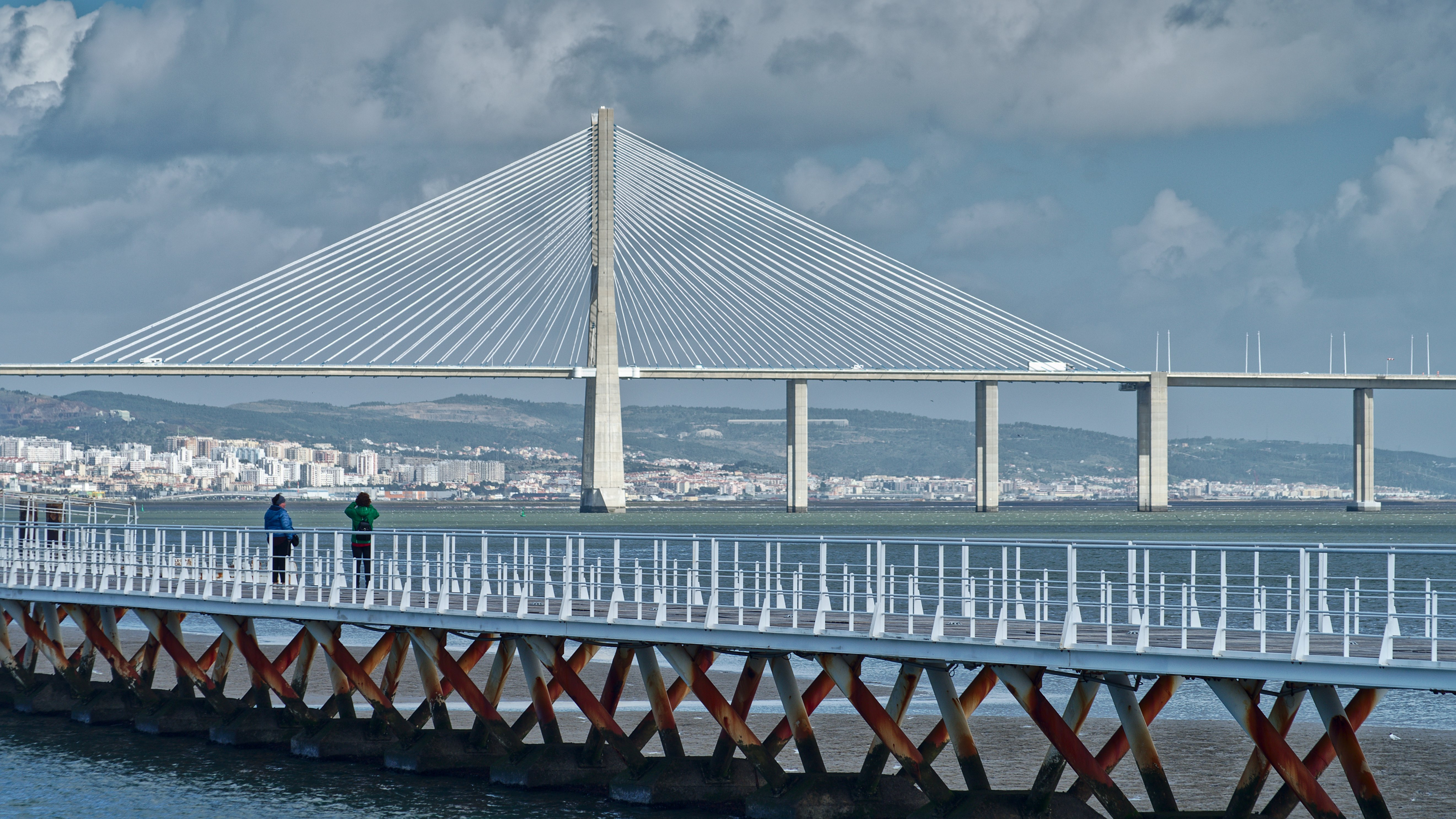 Ponte Vasco da Gama, Lisbon.